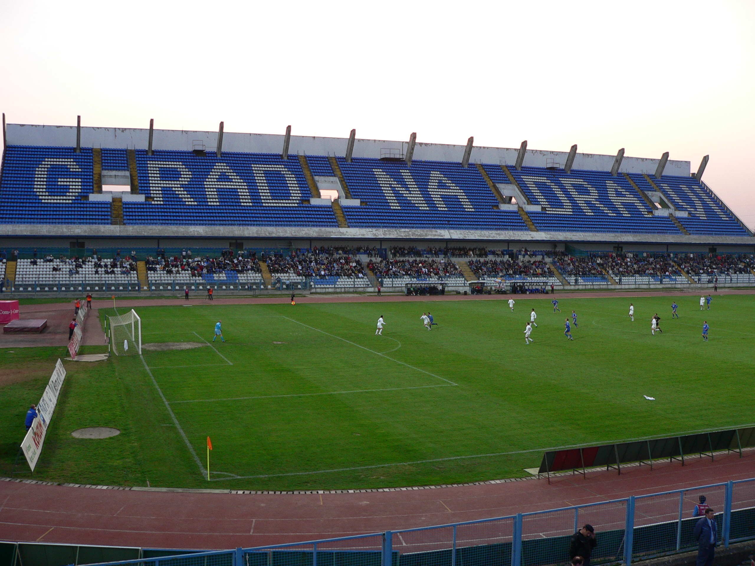 Gradski vrt stadium, Osijek, during a NK Osijek-Dinamo Zagreb match